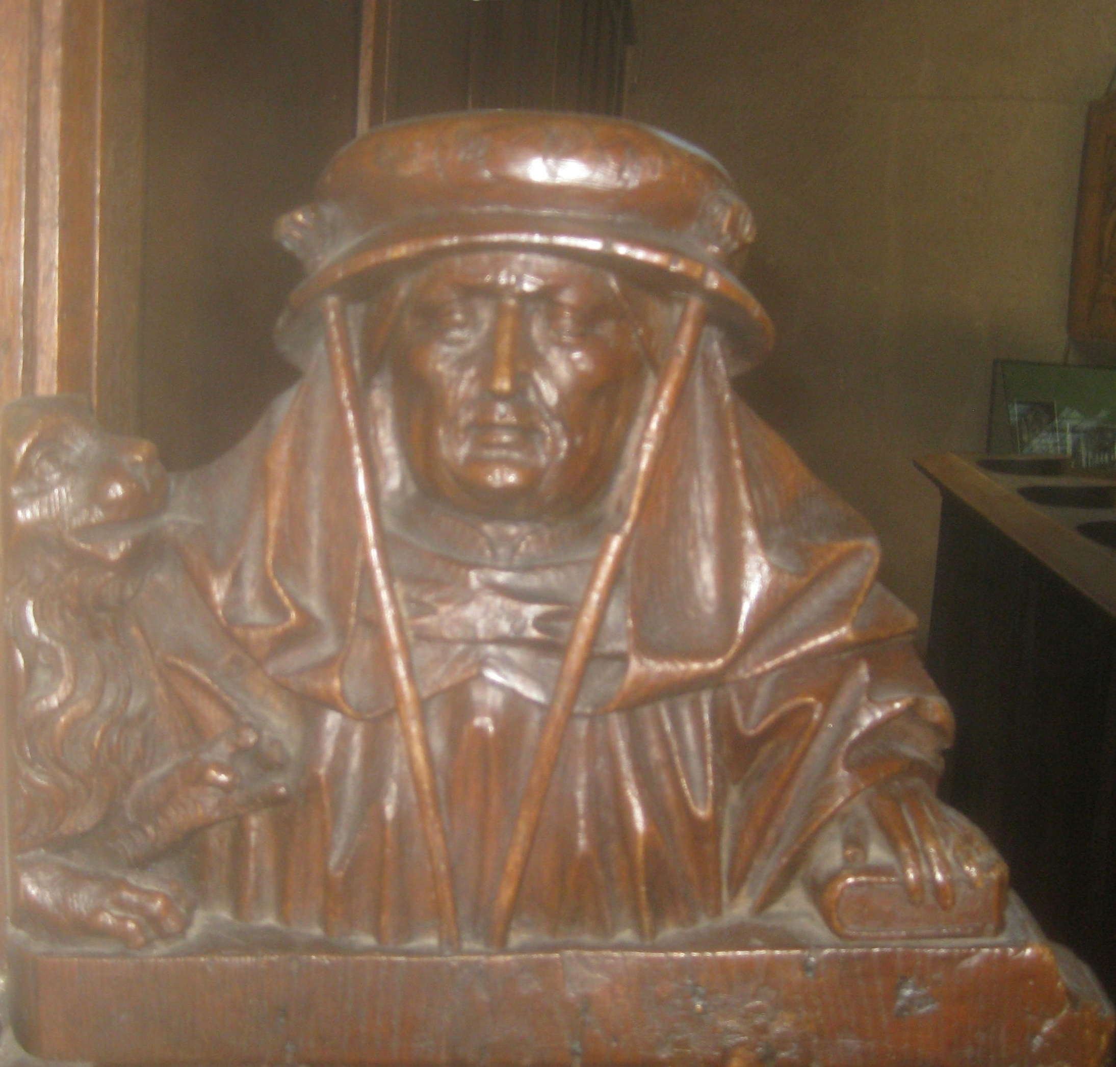 Chorgestühl der Leonhardskirche, Südwestfassade, hintere Sitzreihe, linke Abschlusswange, Aufsatzbüste des heiligen Hieronymus.